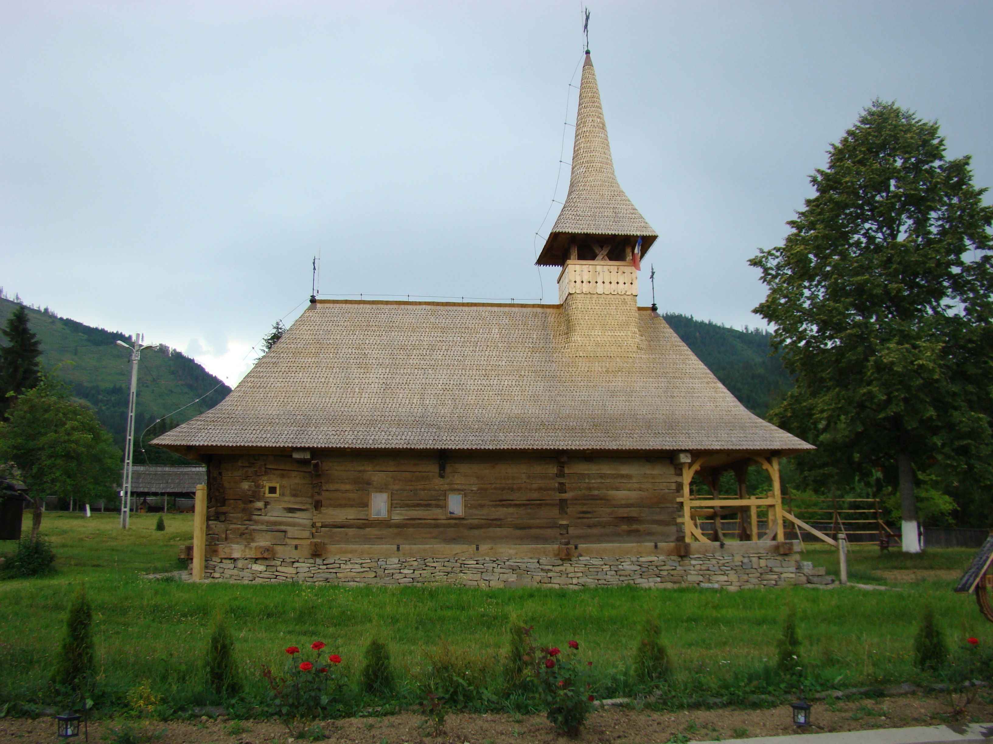 Biserica de lemn "Adormirea Maicii Domnului" a fostei mănăstiri "Izvoru Negru" , sat MOISEI 01